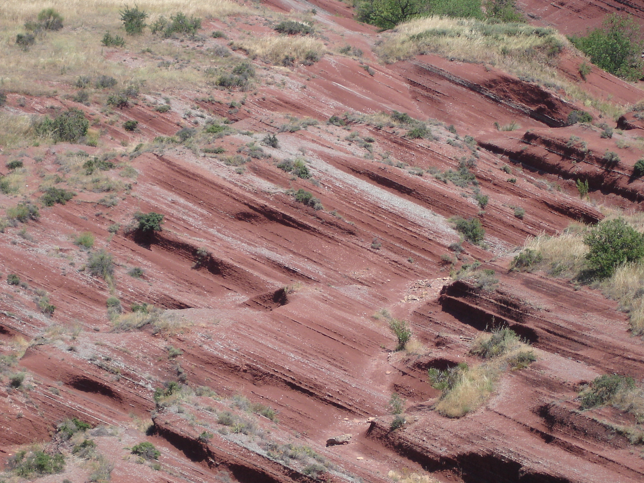 Argilite au Bassin de Lodève en France dans l'Hérault (34), la Lieude, Mérifons. Argile rouge avec du fer oxydé, argile bleu vert avec du fer